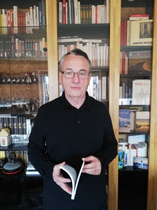 Michel Jacquet